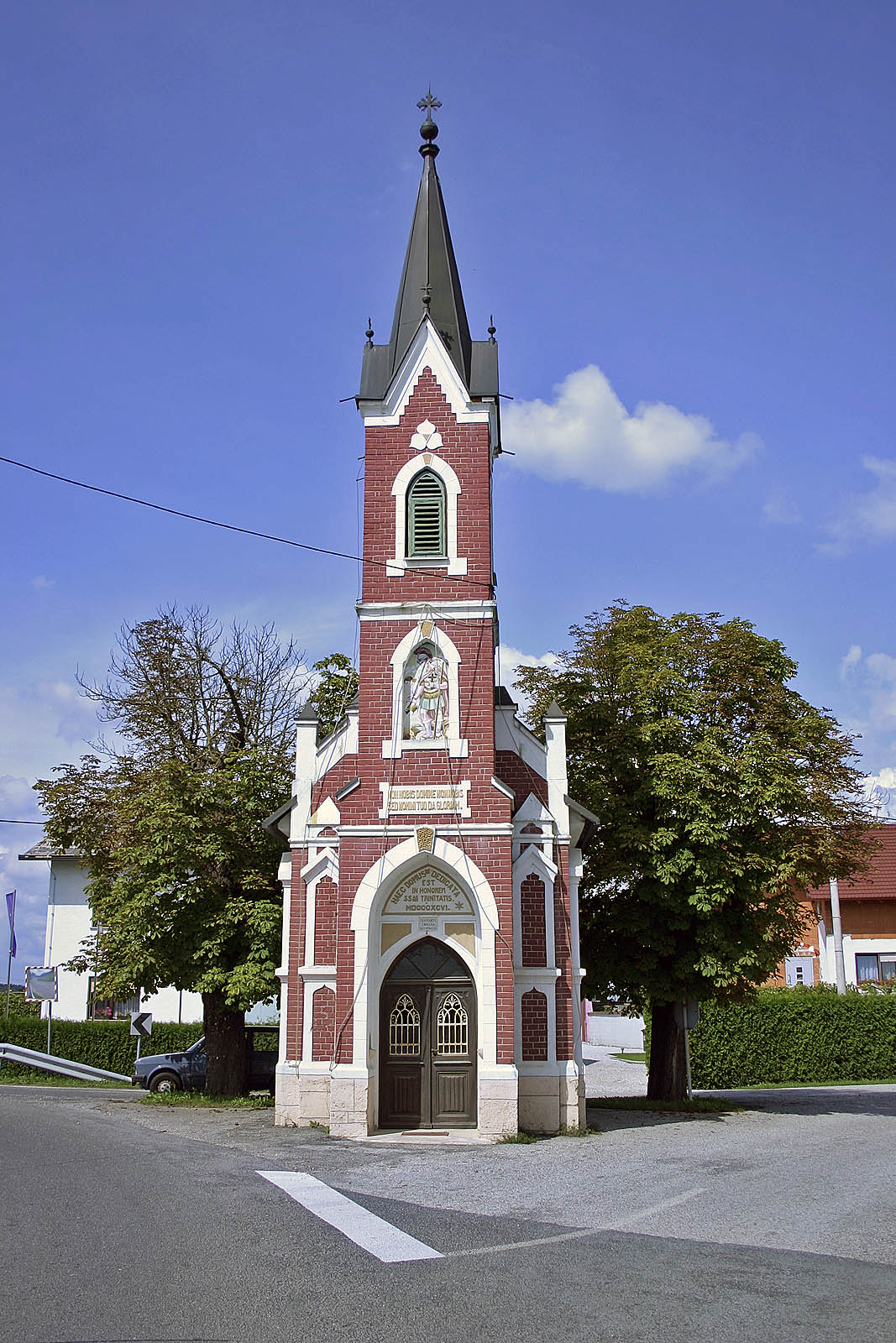 Kapela Svete Trojice, Skakovci. Trinity chapel, Skakovci. Dreifaltigkeit Kapelle, Skakovci.